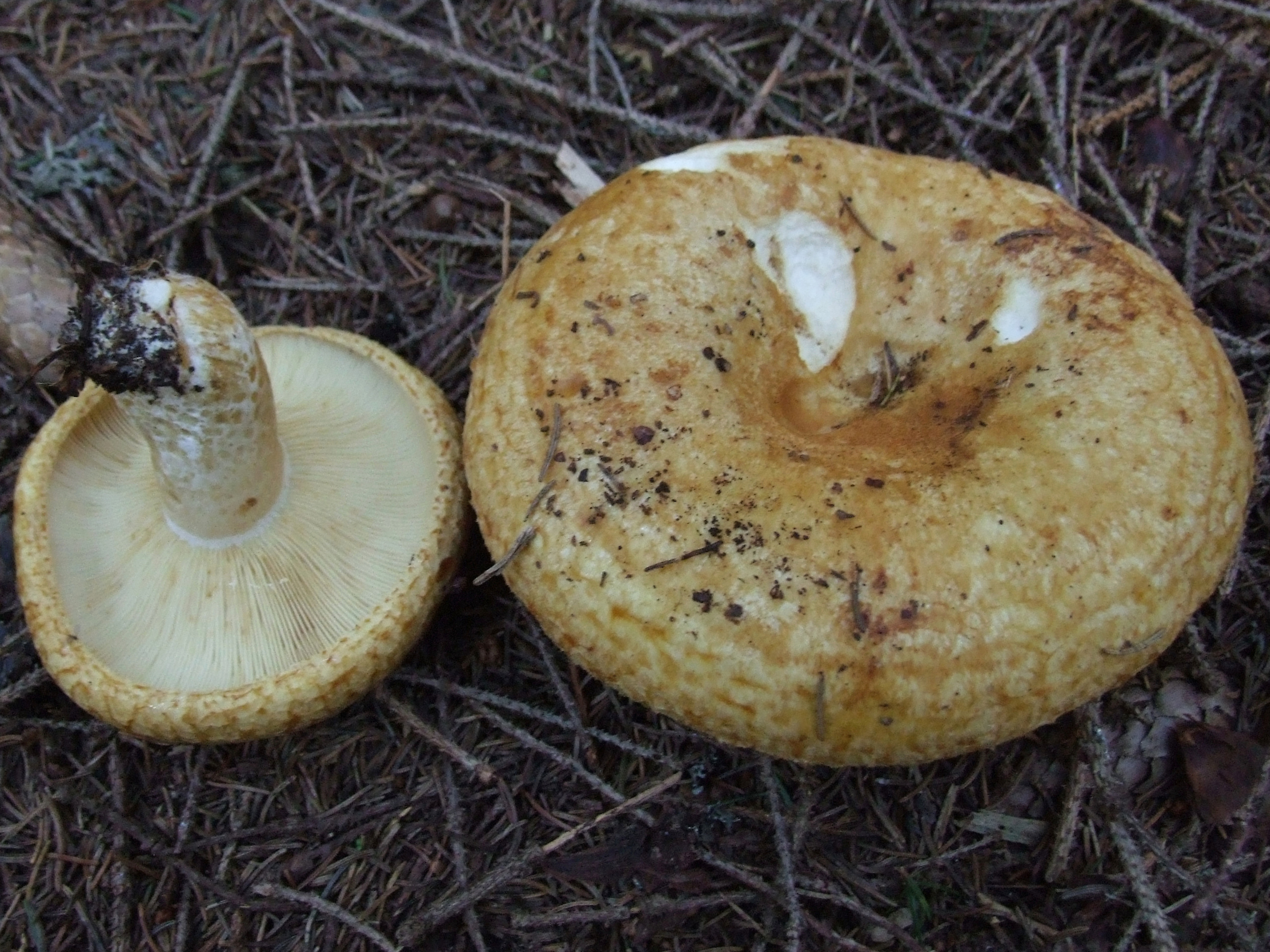 Lactarius scrobiculatus (location: Poland)